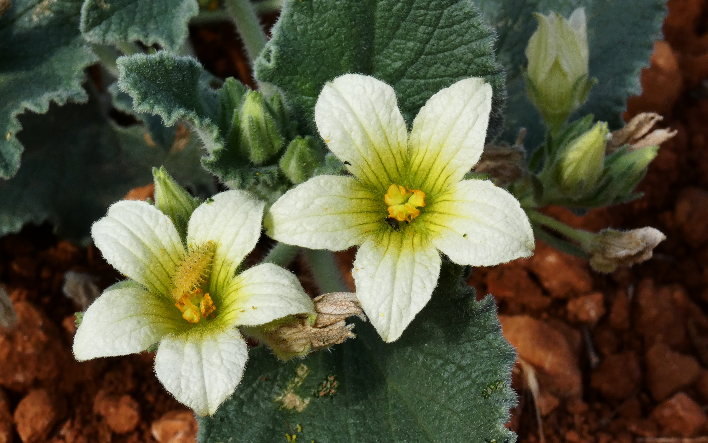 Flores de la planta llamada por aquí pepinillo del diablo. Perdón. Cometí un error titulando la foto "Dos flores de Bryonia dioica". Como se ve ahora, son de Ecballium elaterium, en España llamada pepinillo del diablo. Las flores de estas dos plantas son muy parecidas.